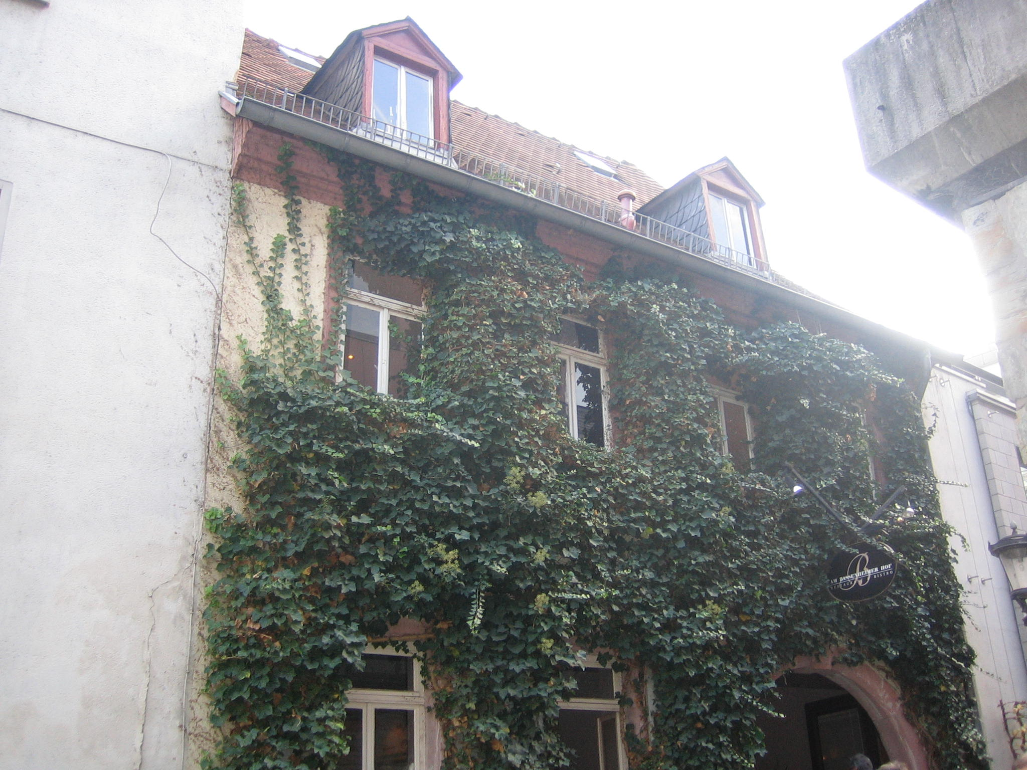 Kulturdenkmal Acker 10 in Mainz-Altstadt: nachbarocke Hofanlage, bezeichnet 1794; Putzbau, teilweise wohl Fachwerk